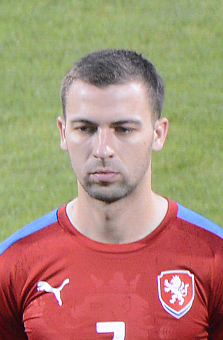 Mezinárodní fotbalový zápas Česko - Rakousko v Olomouce